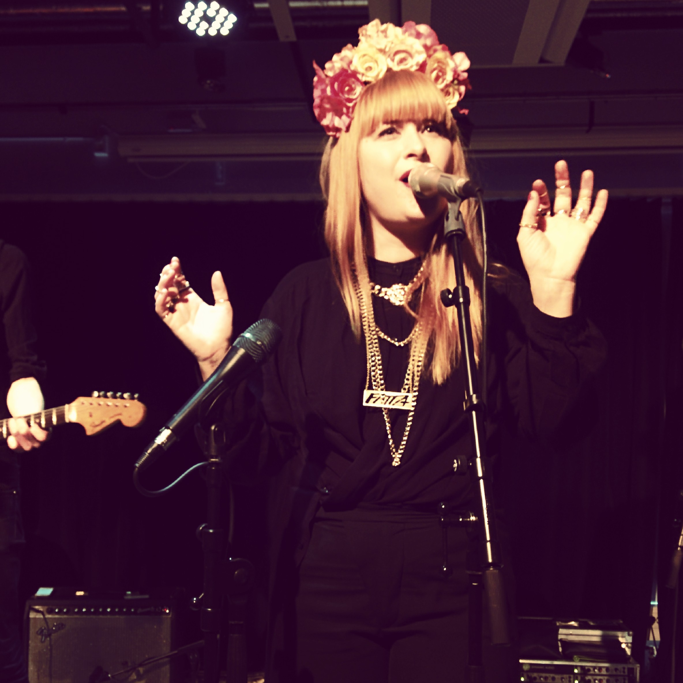 Linnea Henriksson performing live at Spotify HQ, Stockholm, Sweden, March 27, 2014.